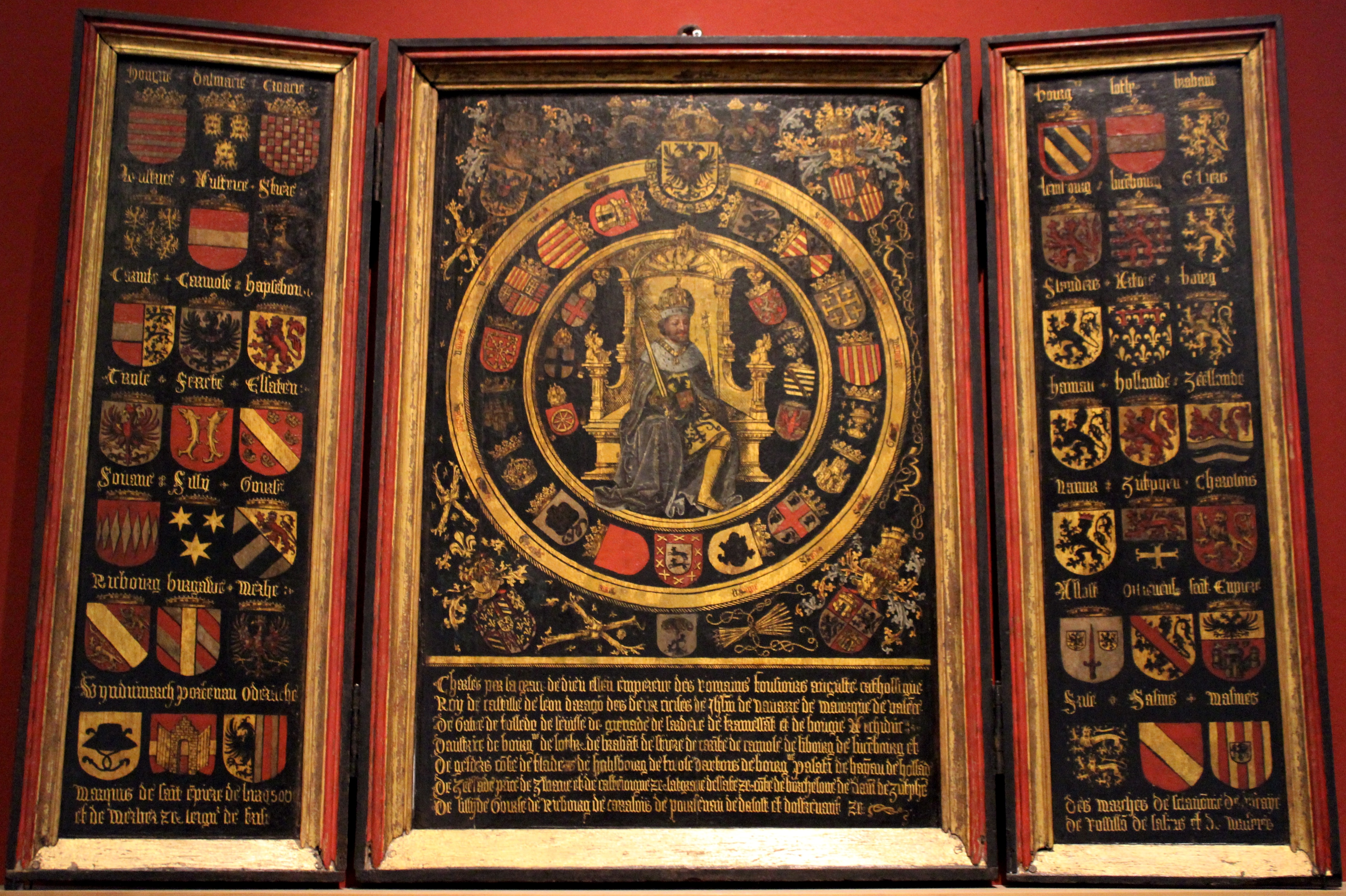 Berlín, DHM. Tríptico con Carlos V y sus dominios, copia de Jan van Battel, ca. 1540-1550.